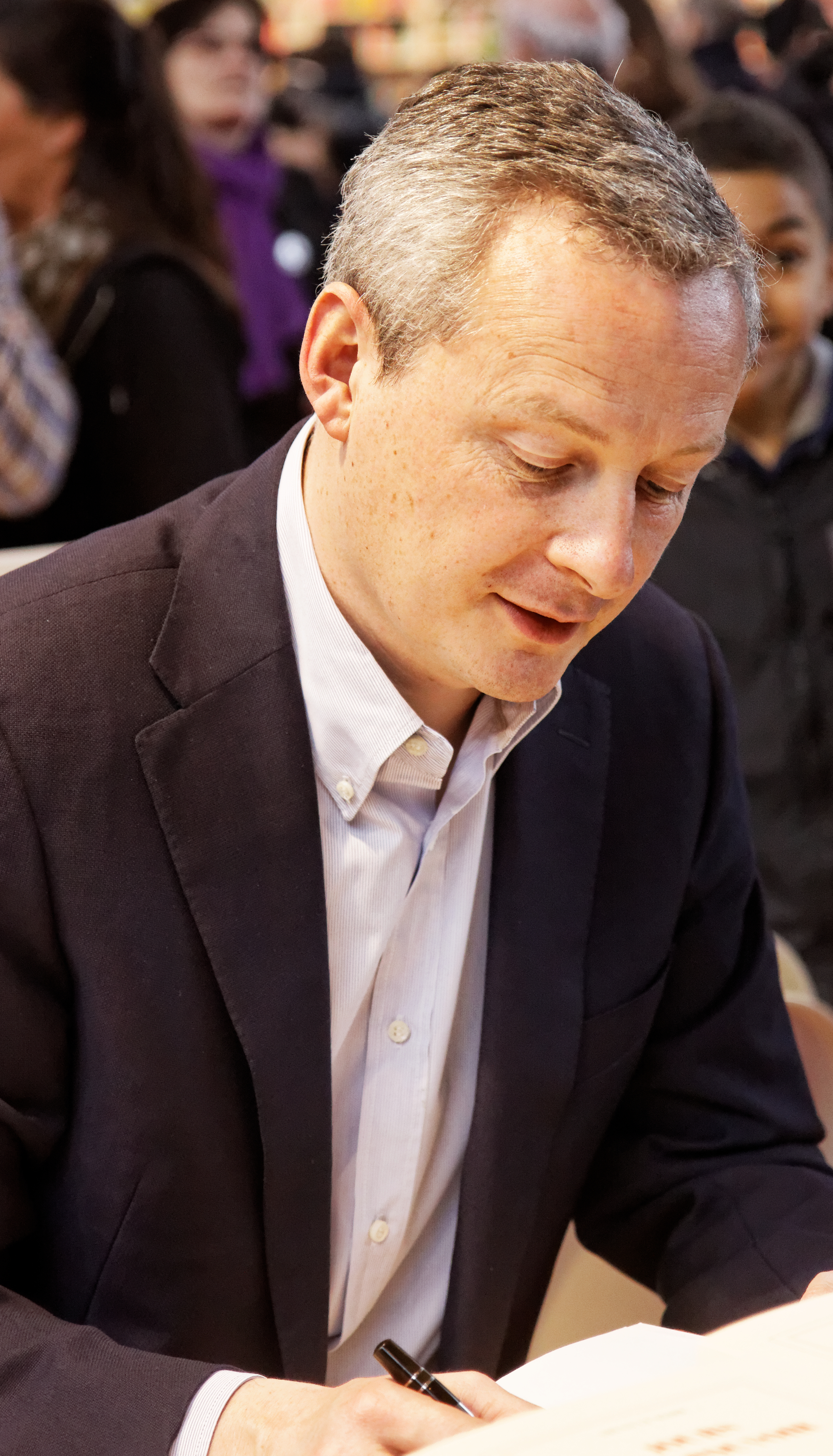 Bruno Le Maire en dédicace lors du salon du livre de Paris 2013.